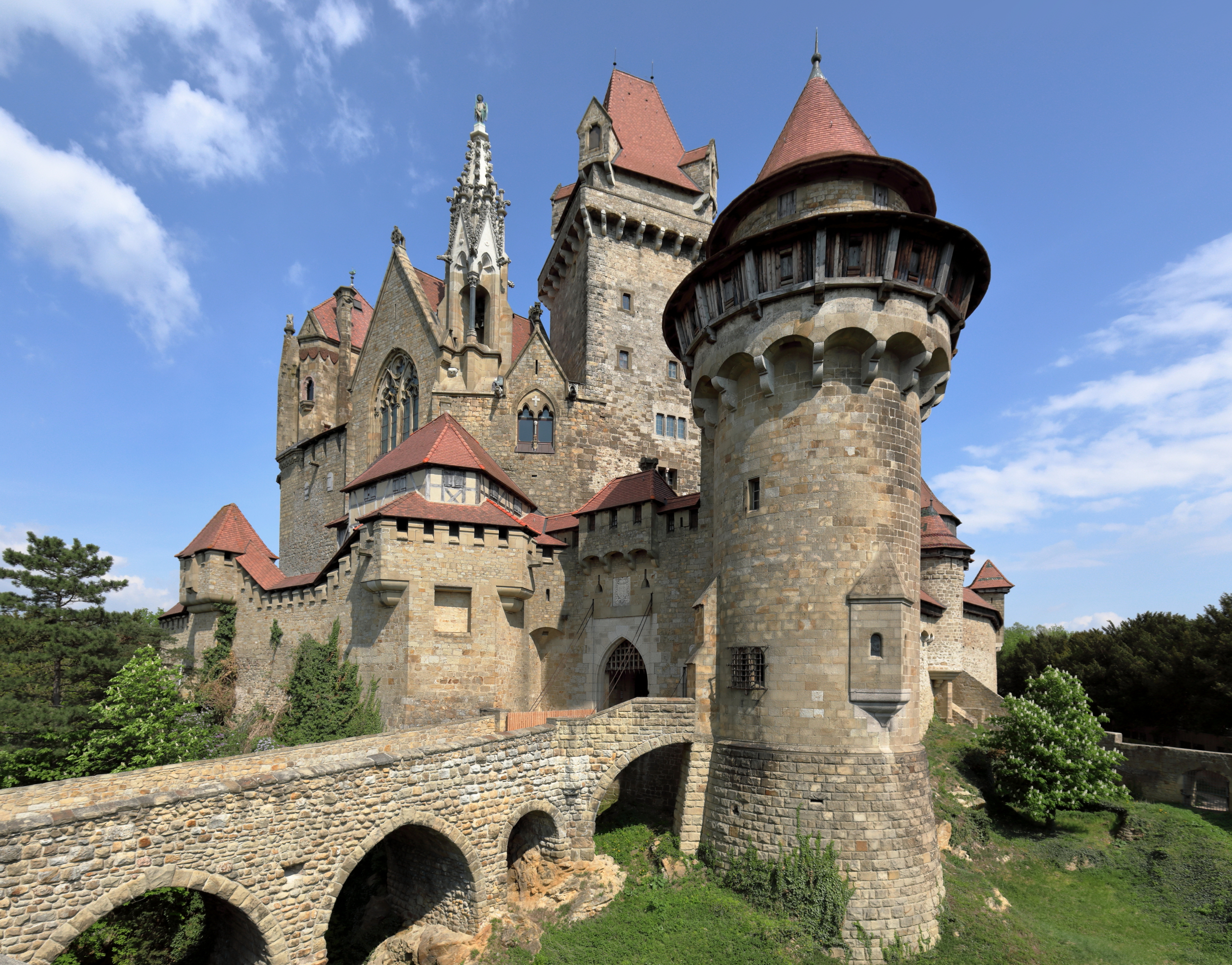 Westsüdwestansicht der Burg Kreuzenstein in der niederösterreichischen Marktgemeinde Leobendorf.Die ursprüngliche Burg wurde im Zuge des 30-jährigen Krieges zerstört und anschließend als Baumaterial großteils abgetragen. Unter Graf Johann Nepomuk Wilczek erfolgte von 1874 bis 1906 ein Wiederaufbau der Burg als Museum für seine umfangreichen Kunstsammlungen. Die so entstandene Schauburg ist heute, ergänzt durch zahlreiche wiederverwendete mittelalterliche Bauteile und nach teilweiser Beseitigung der Brandschäden von 1915 und der Kriegsschäden von 1945, ein beliebtes Tourismusziel nördlich von Wien.